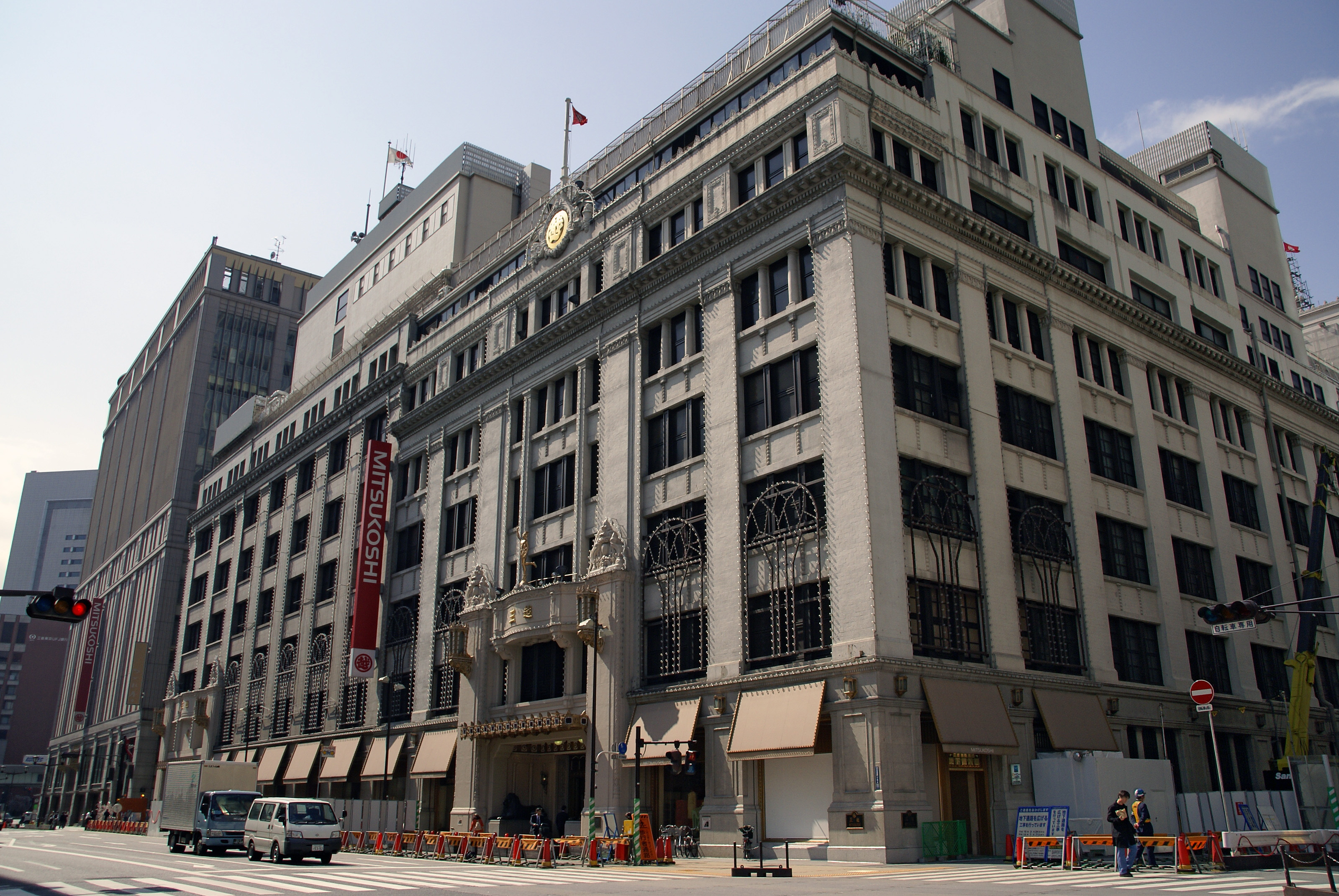 Mitsukoshi department store in Nihombashi, Chuo-ku, Tokyo, Japan